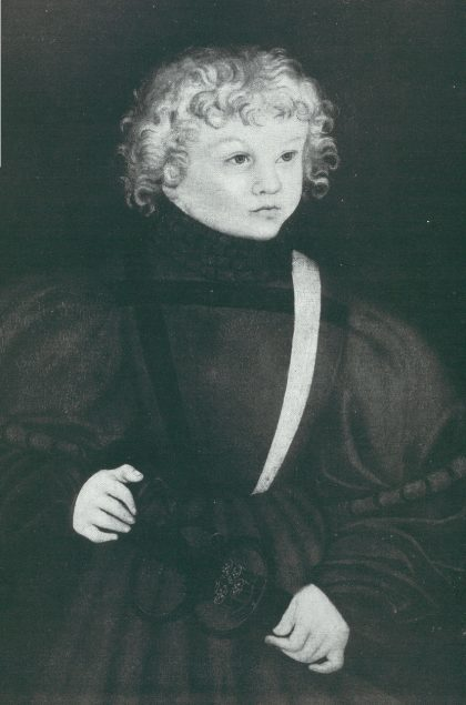 Severinus (1522-1533), Prinz von Sachsen